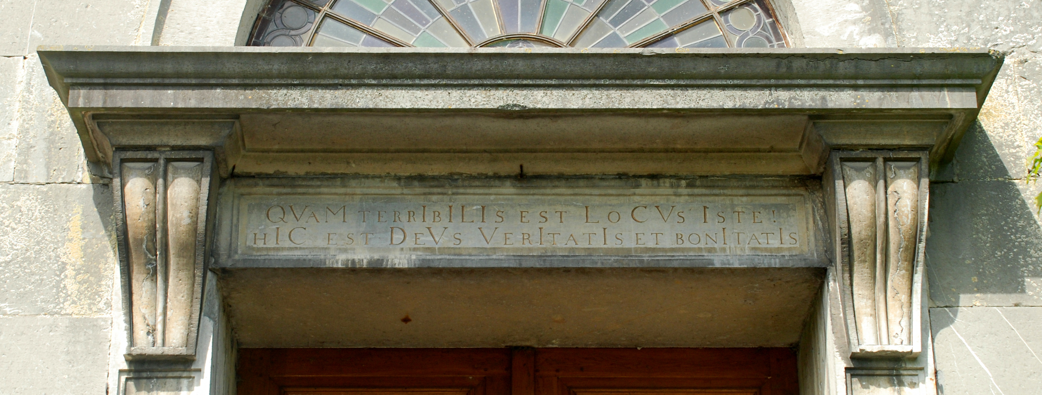 Belgique - Province de Namur - Viroinval - Nismes - église Saint-Lambert (1829)